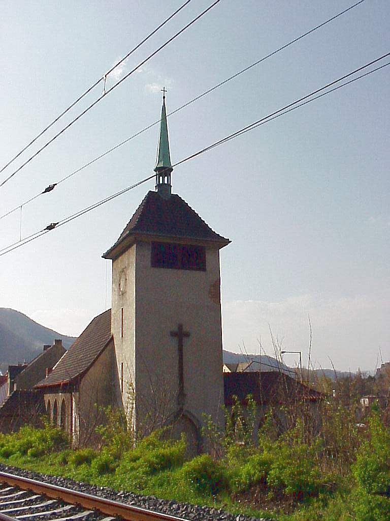 church in Vaňov